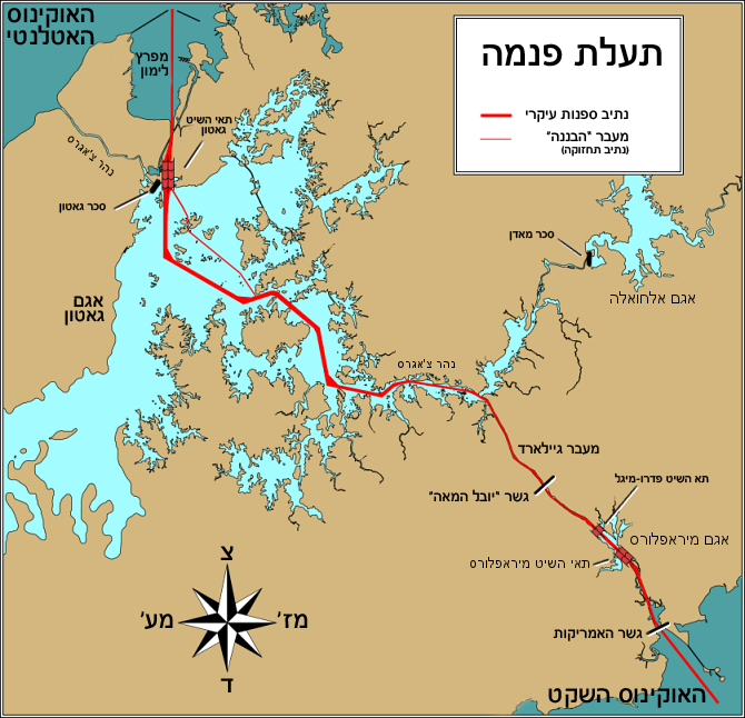 תרשים מפורט בעברית של תעלת פנמה.